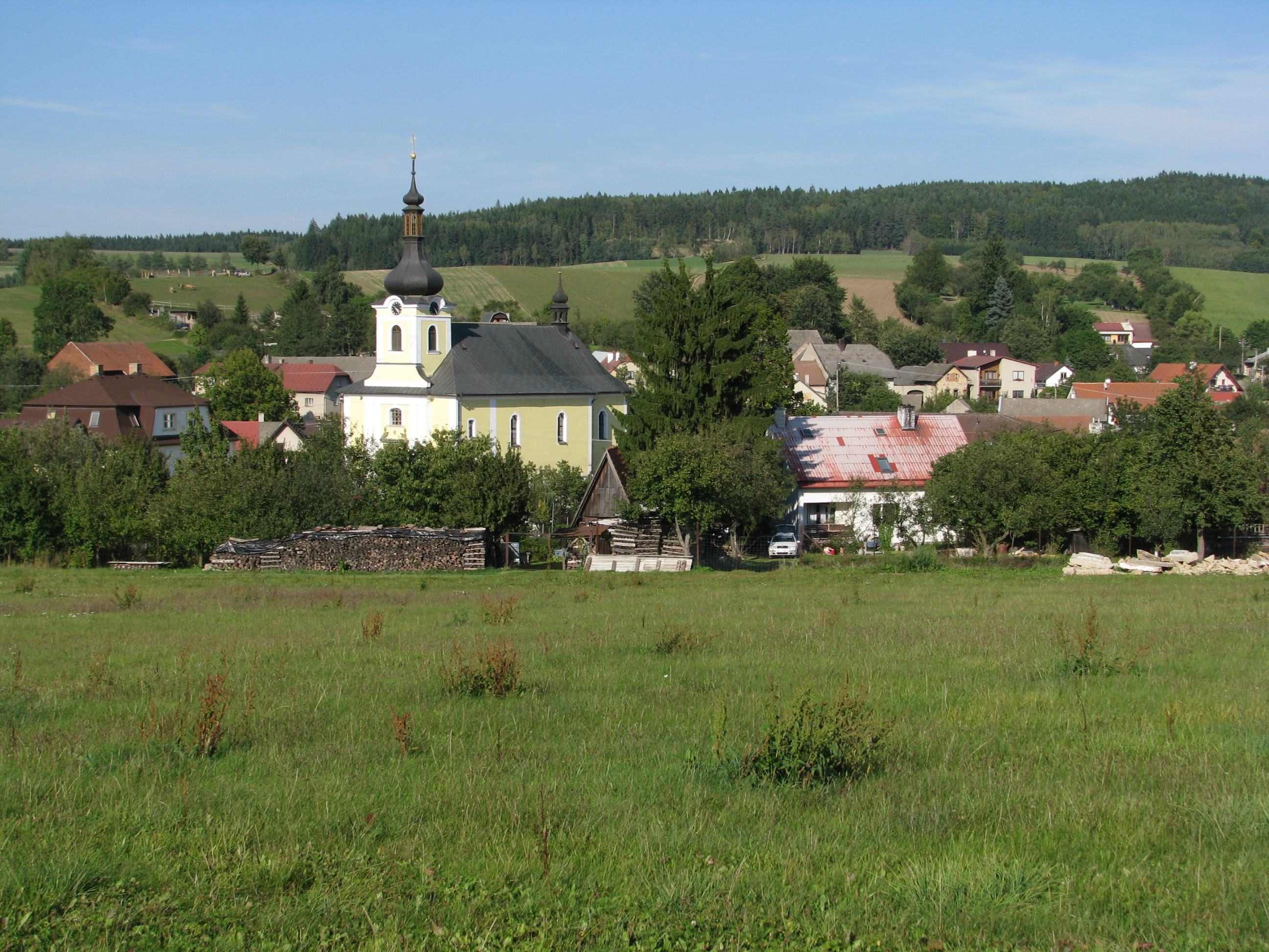 Kostel sv. Václava (Radešínská Svratka), Radešínská Svratka